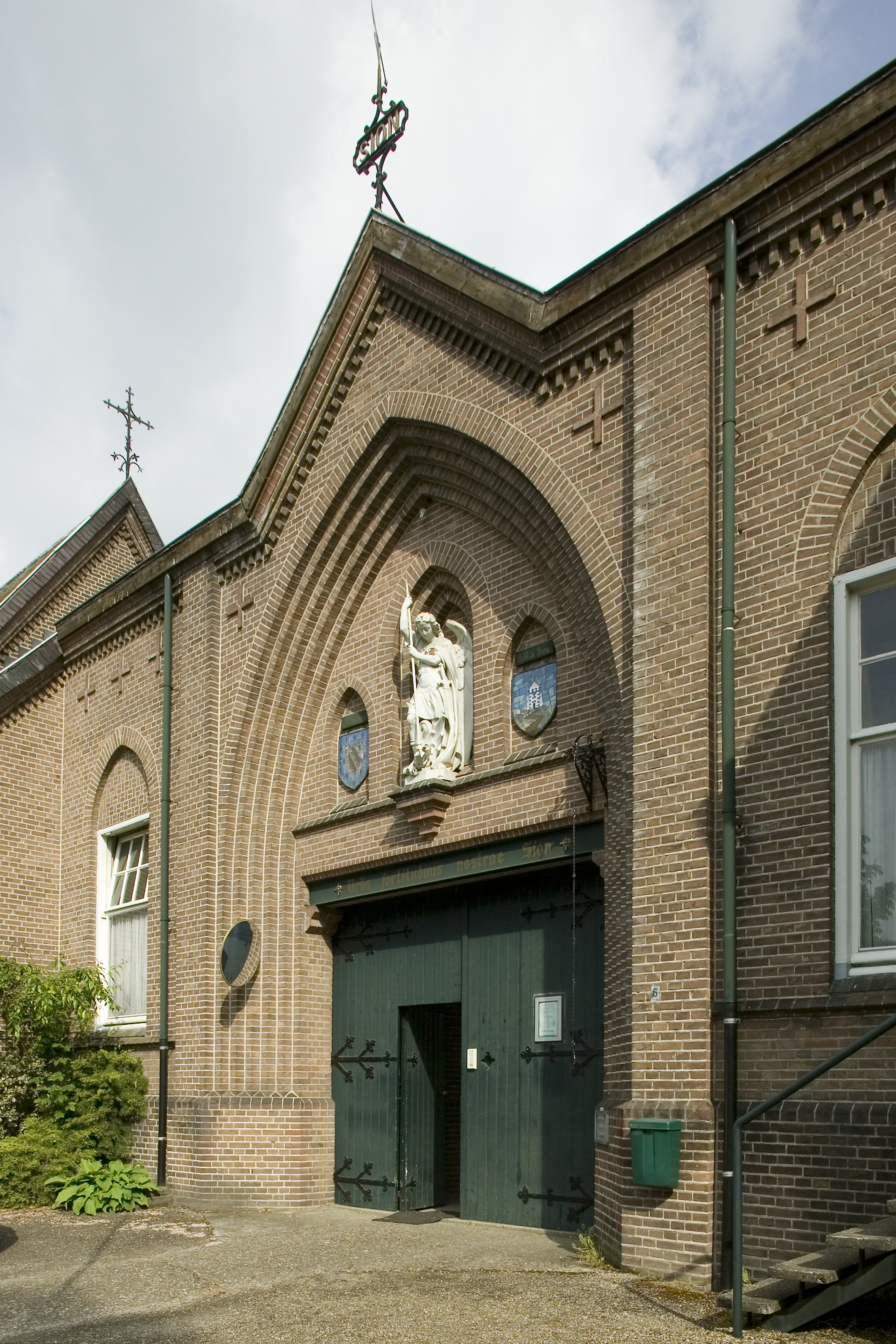 Abdij Sion: Overzicht van de ingang van het kloostercomplex, straatzijde